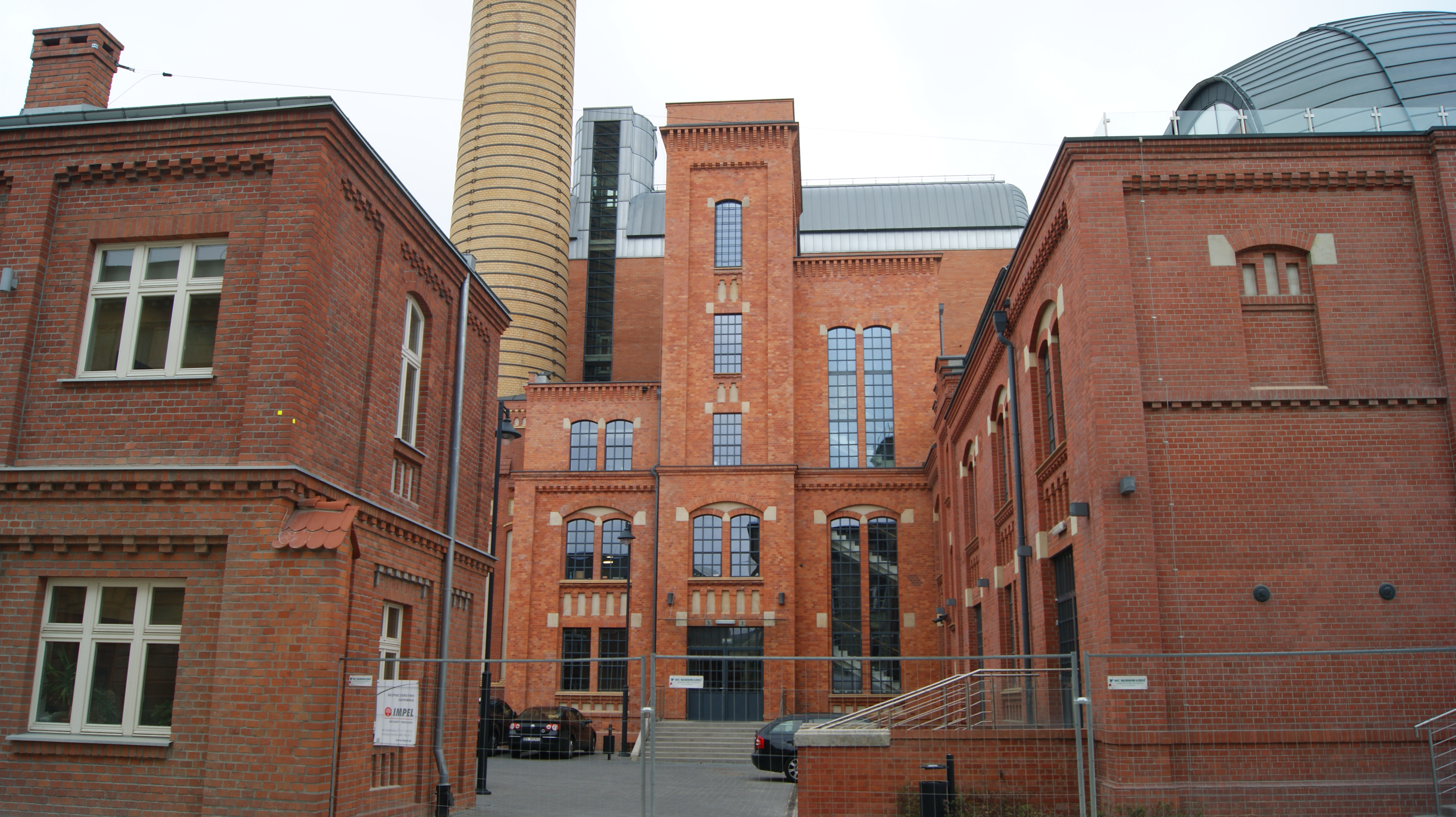 EC-1 to pierwsza łódzka elektrownia, uruchomiona w 1907 roku przy ul Targowej. Działała do 2005 roku. Obecnie zespół budynków dawnej EC-1 został poddany rewitalizacji, z celem przekształcenia go w Centrum Naukowo-Kulturalne